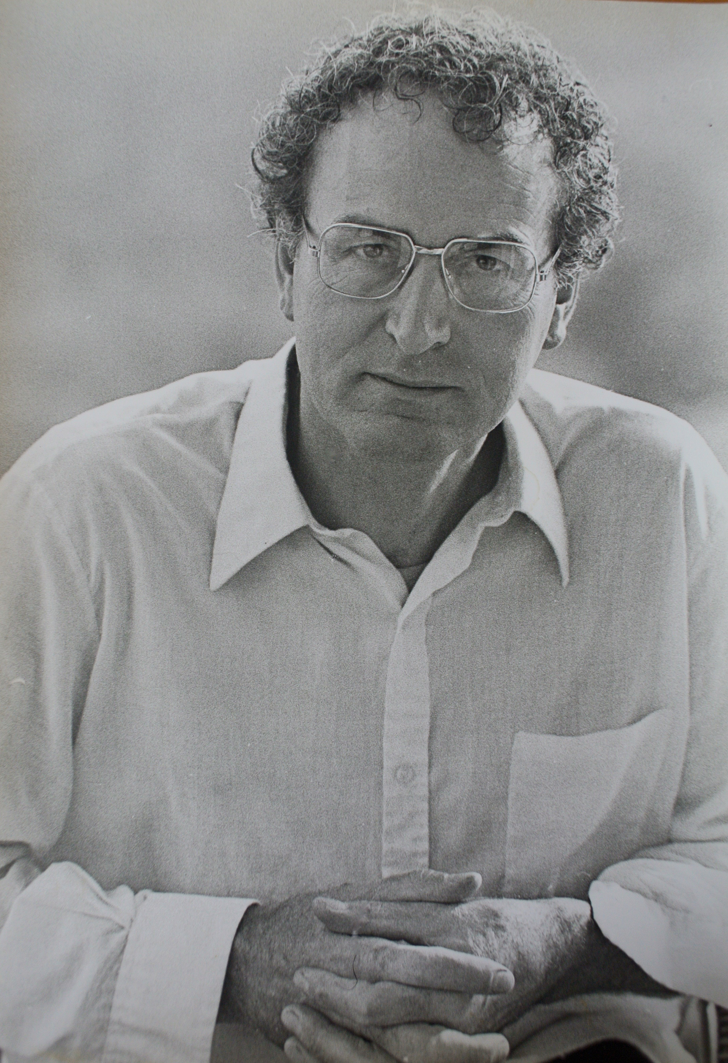 poète, dramaturge, écrivain